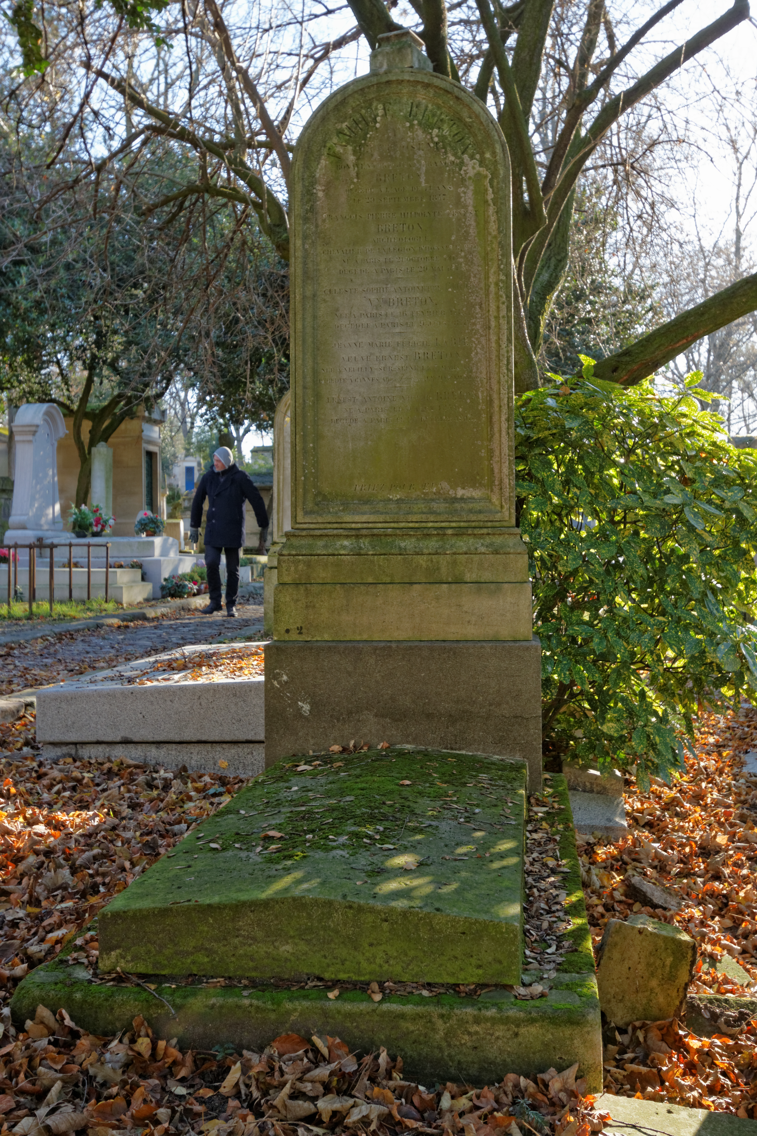 Stèle